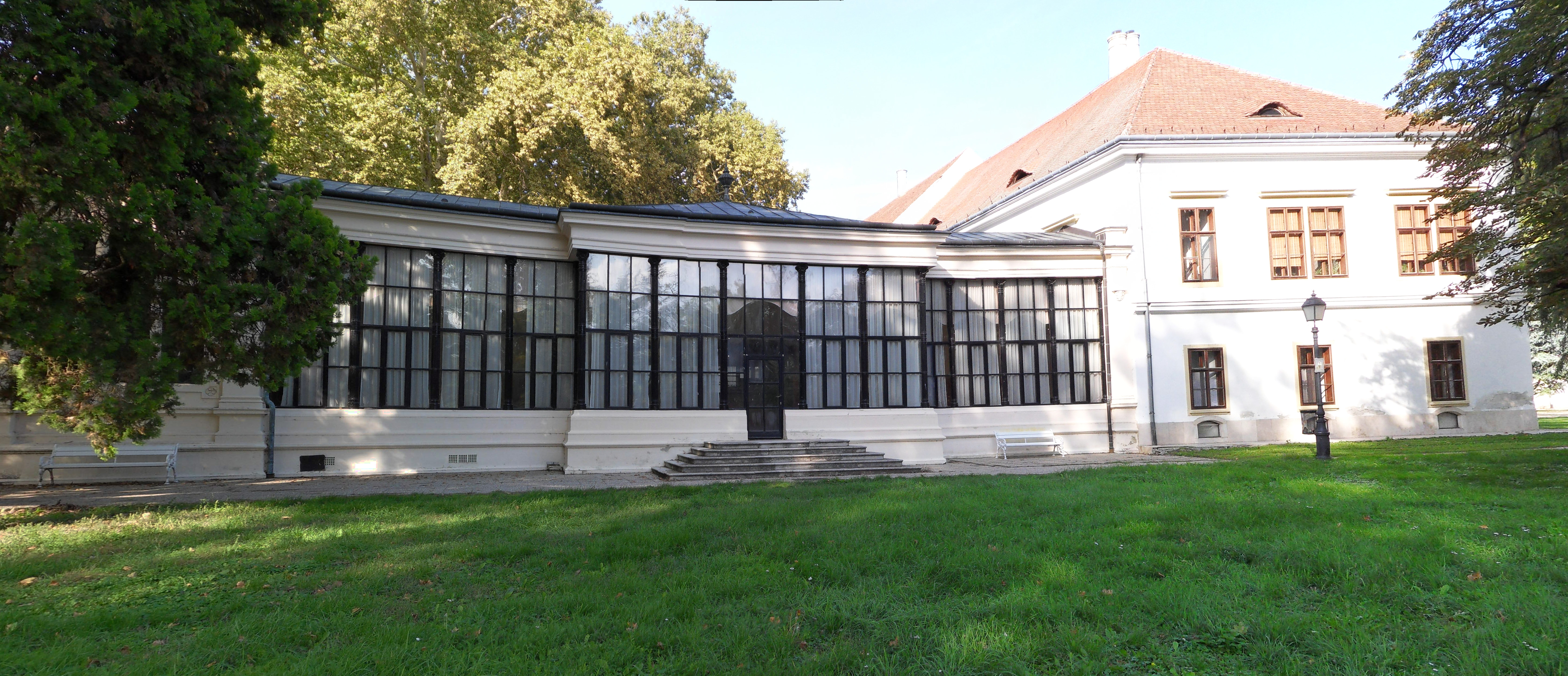 Széchenyi-kastély, Nagycenk – virágház (kastélyszálló) This is a photo of a monument in Hungary. Identifier: 18193